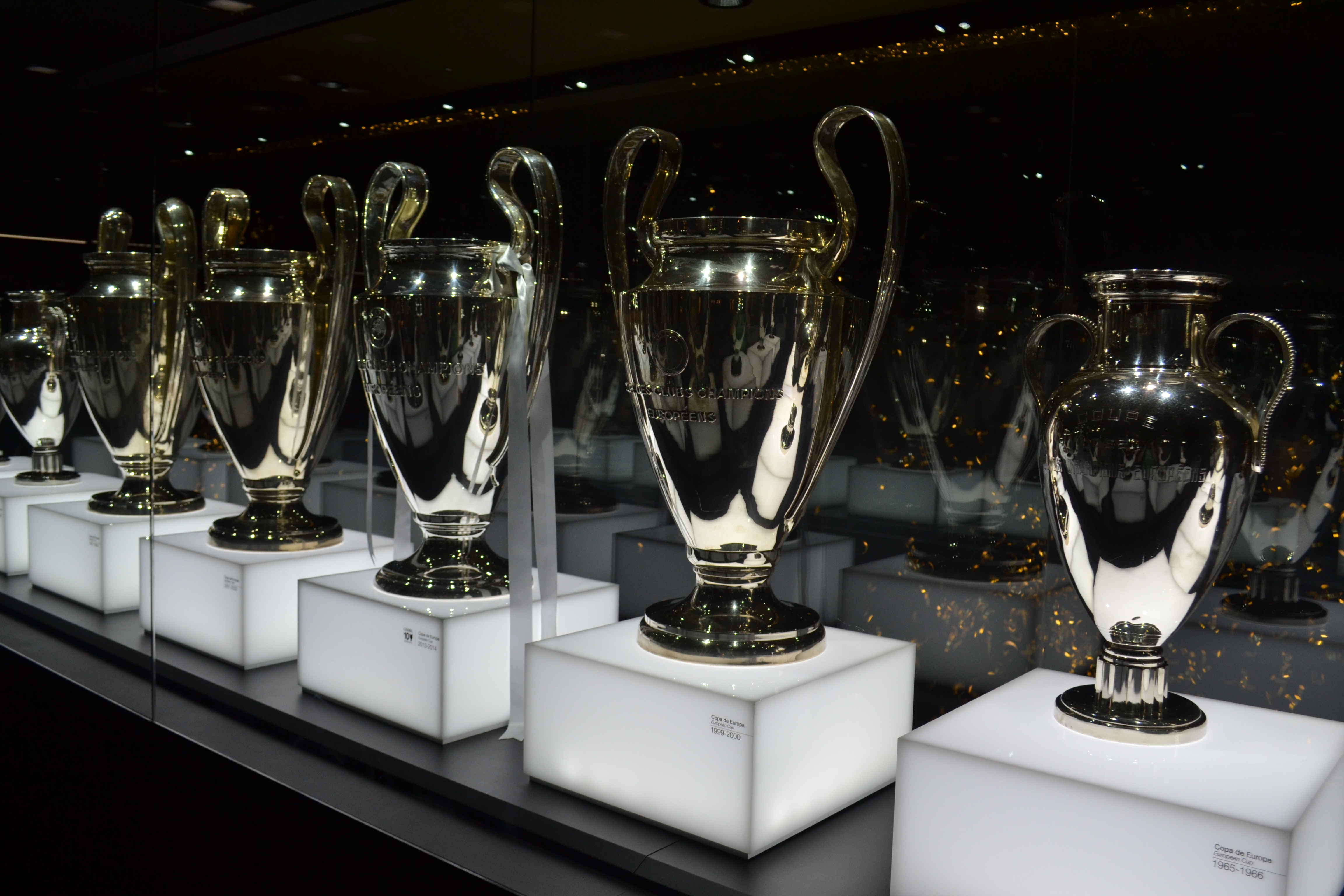 Bernabéu Tour (6)